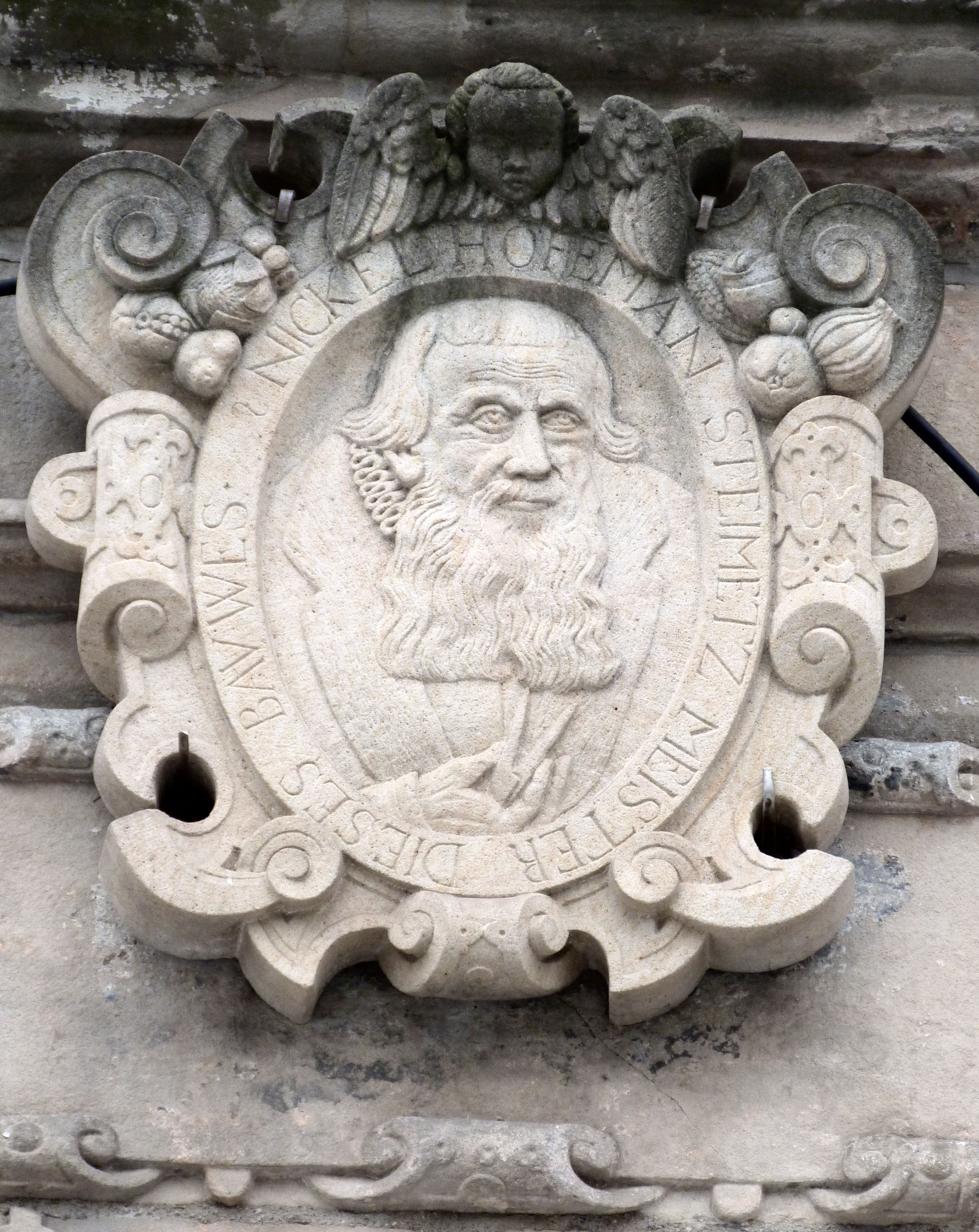 Reliefporträt des Baumeisters Nickel Hoffmann über dem Bogen des inneren Eingangs, Kopie des Reliefs vom Ende d. 16. Jh. (Original im Stadtmuseum), Stadtgottesacker Halle (Saale)